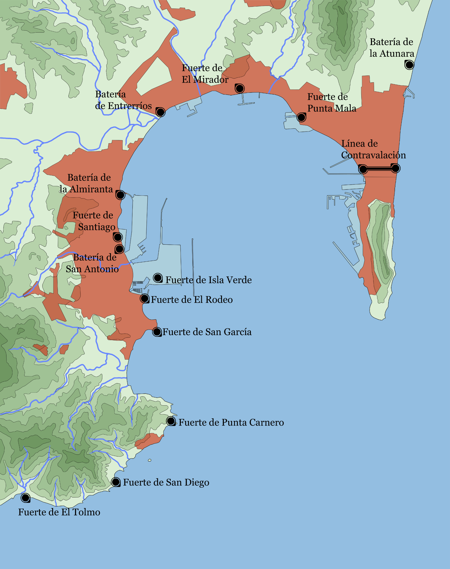 Mapa indicativo de los fuertes costeros en el termino municipal de Algeciras, Andalucía, España.